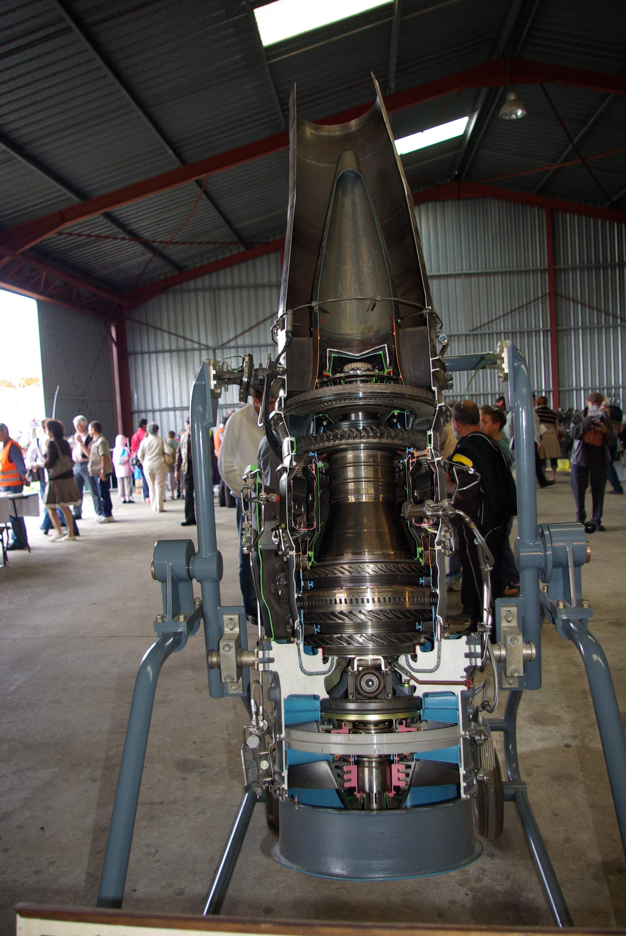 Coupe d'un Snecma-Turbomeca Larzac 04 d'un Alpha Jet